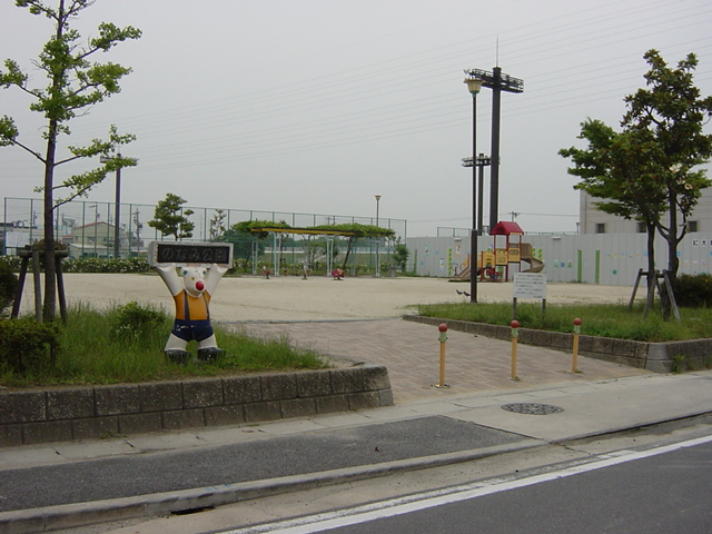 野並公園